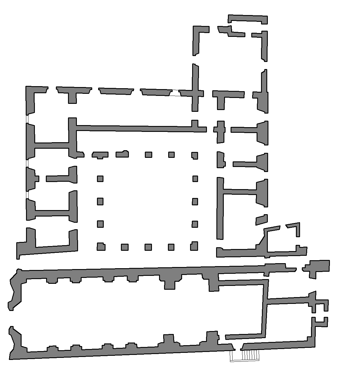 Pianta della chiesa del SS.mo Crocifisso a Palmi (RC) alla fine del XIX secolo, con a lato il convento dei monaci andato distrutto